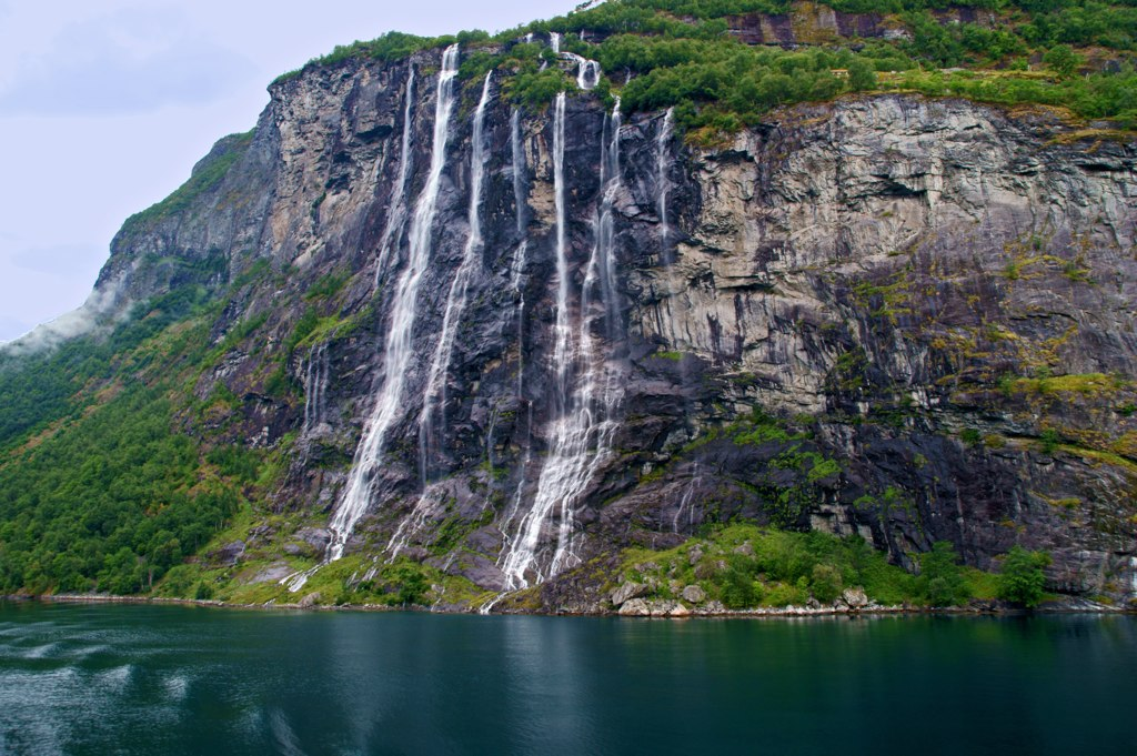 Dei sju systrene i Geirangerfjorden